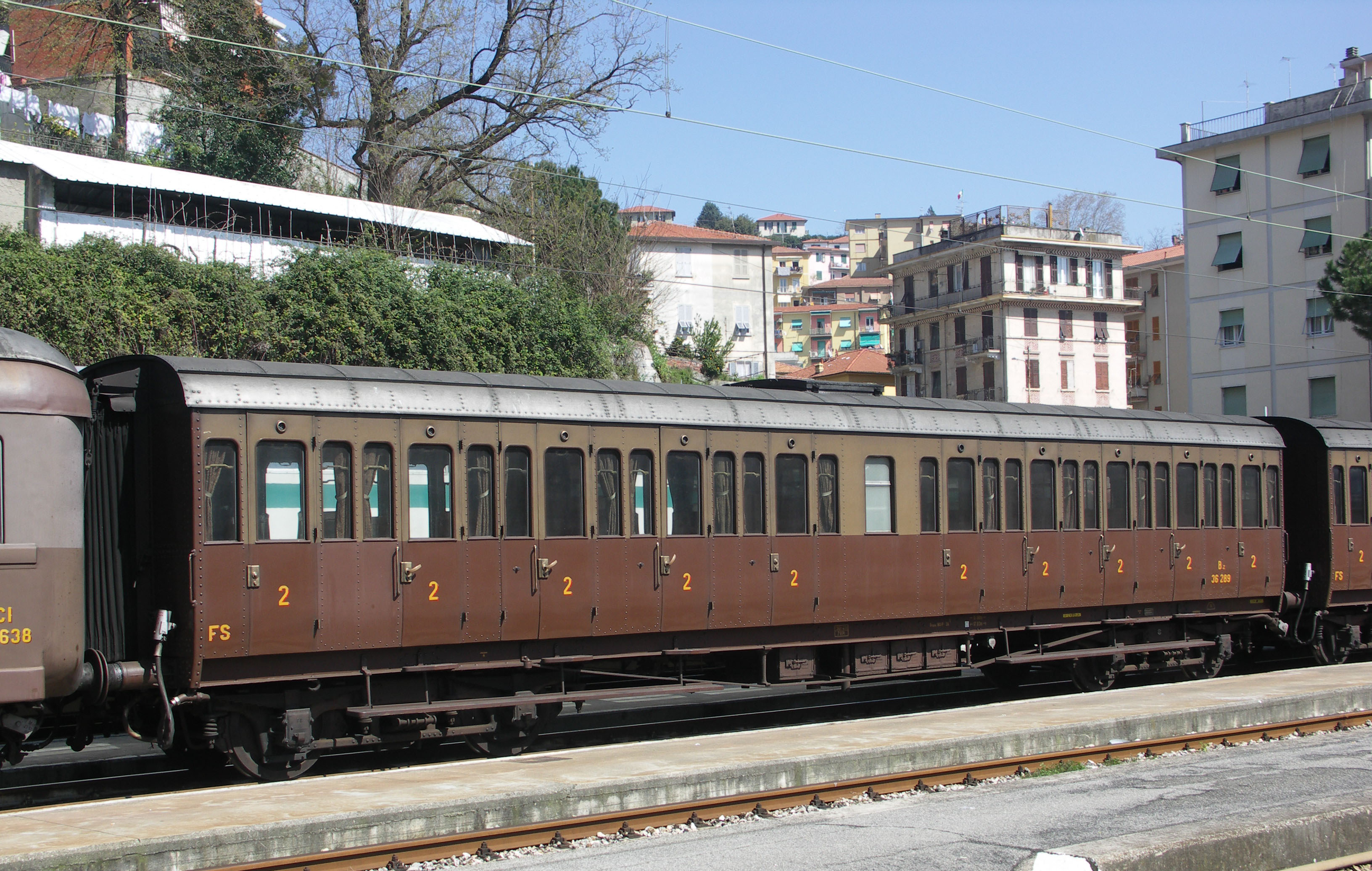 Carrozza FS Bz 36289 centoporte a La Spezia C.le il 2/4/2011